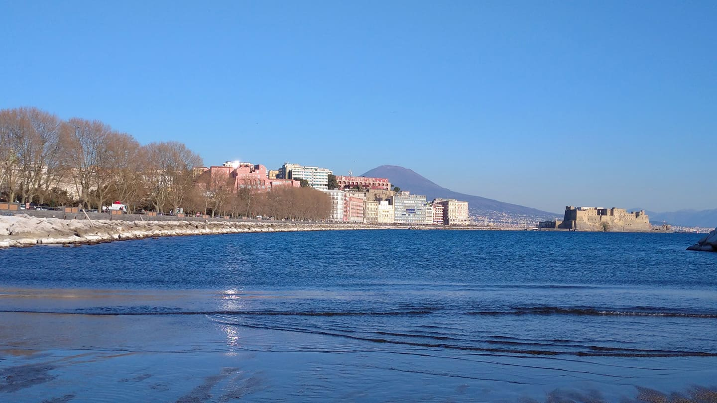 Via Caracciolo (Napoli)